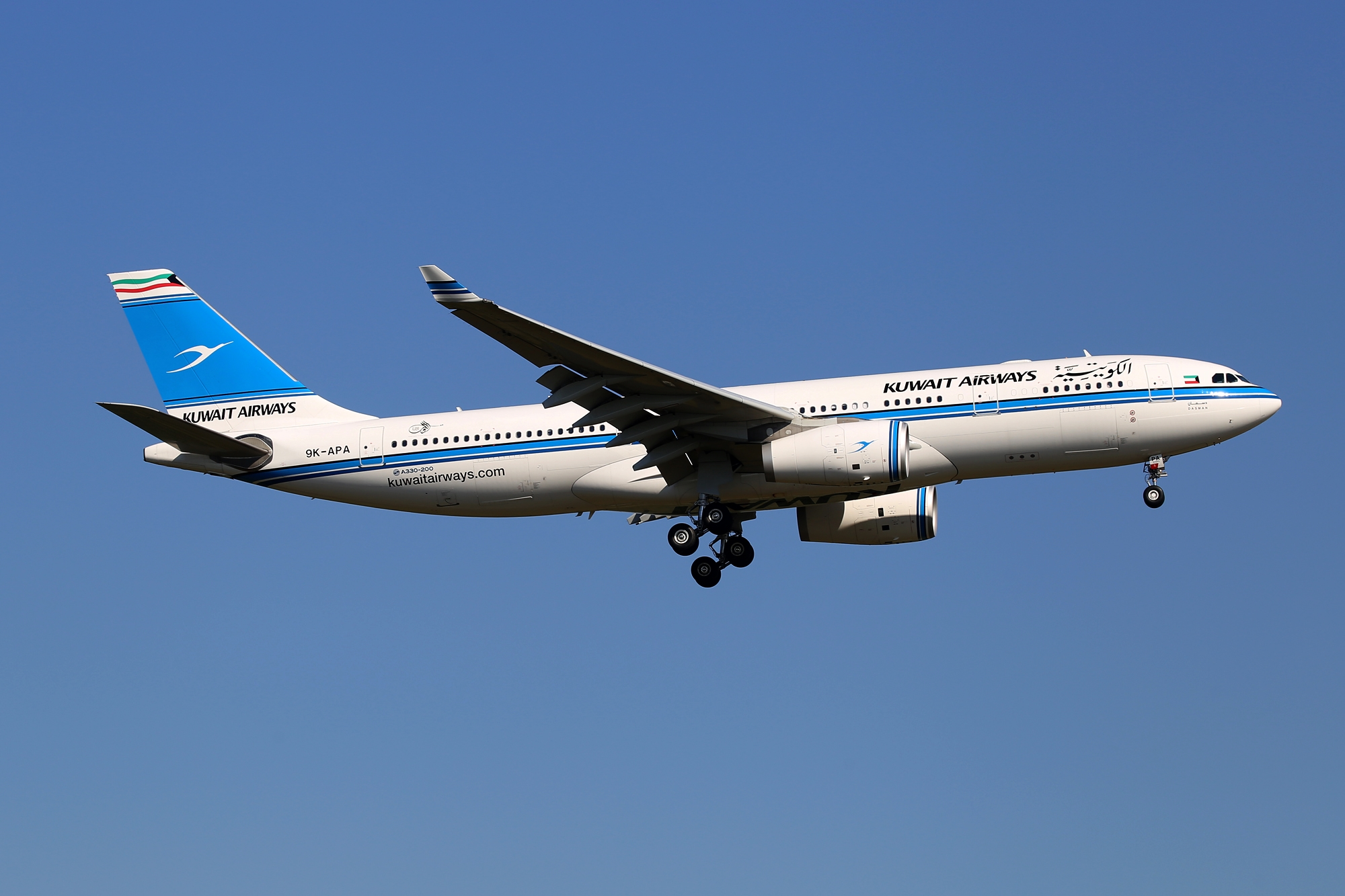 Frankfurt am Main (Rhein-Main AB) (FRA / EDDF / FRF) Germany 8.2016 aus Genf / from Geneva